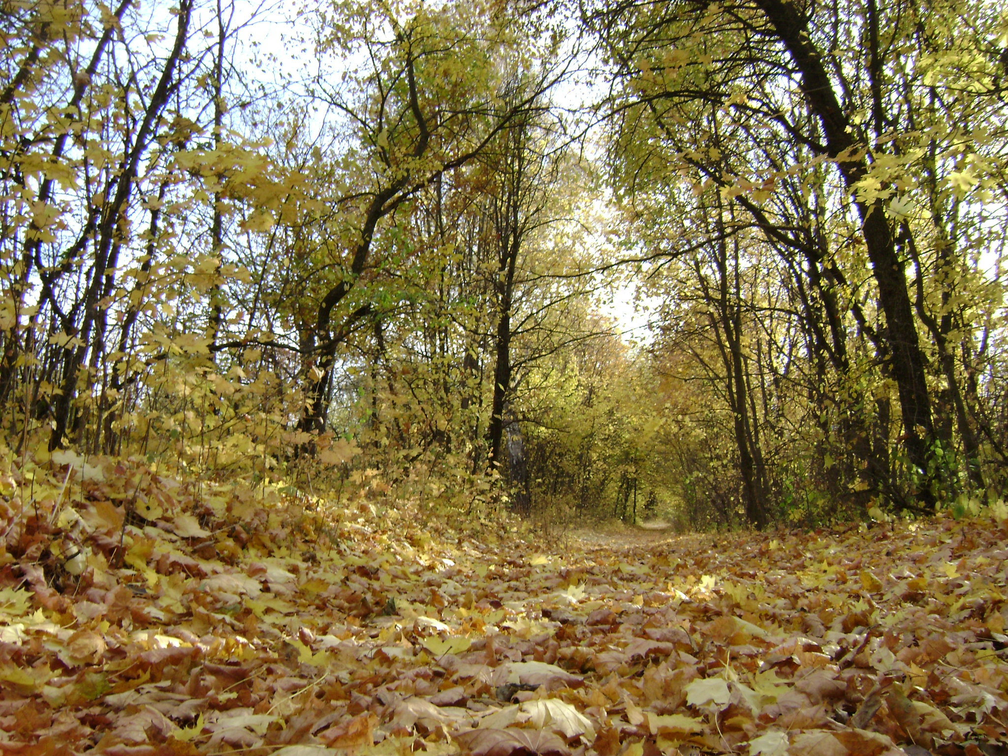 Осень в Горожанке. «Барский сад». (Рамонский район, Воронежская обл., Россия)